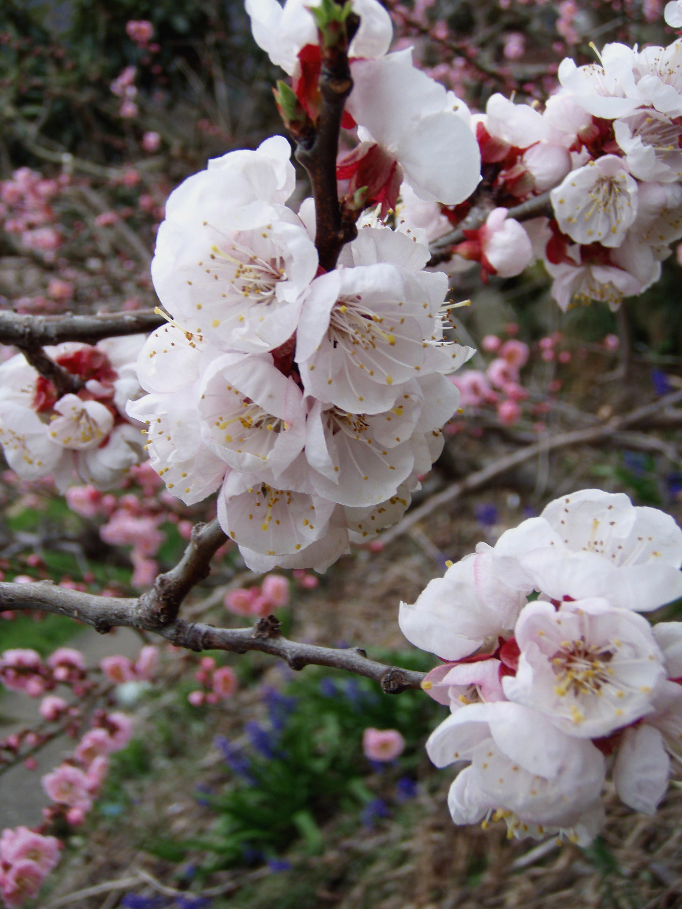 あんずの花 信州大実種 (Nagano pref. Japan.)